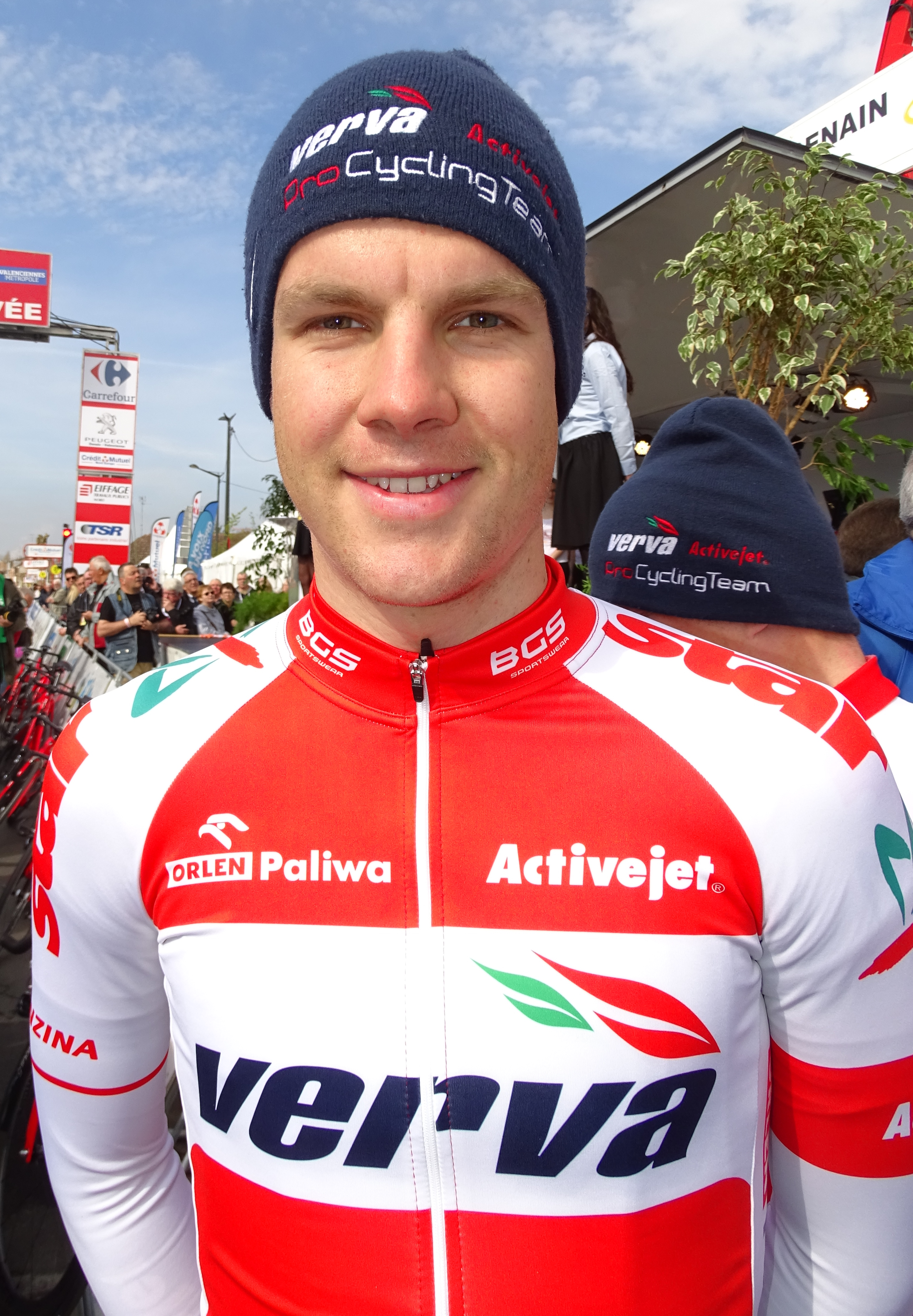 Reportage réalisé le jeudi 14 avril à l'occasion du départ et de l'arrivée du Grand Prix de Denain 2016 à Denain, Nord, Nord-Pas-de-Calais-Picardie, France.